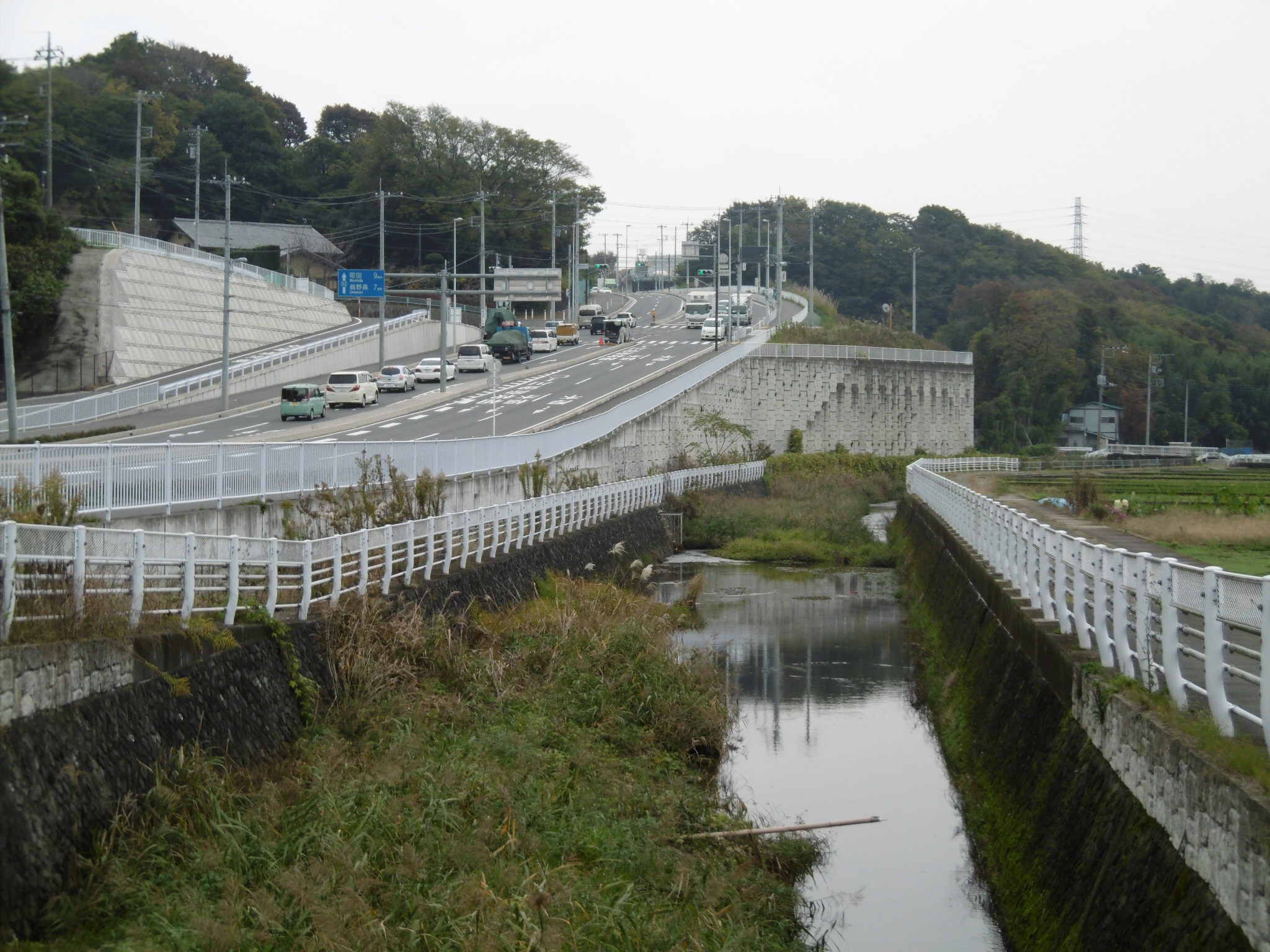 相模原市内に相模川の支流である八瀬川が下に流れる。またその隣に通るのは神奈川県道52号相模原町田線。